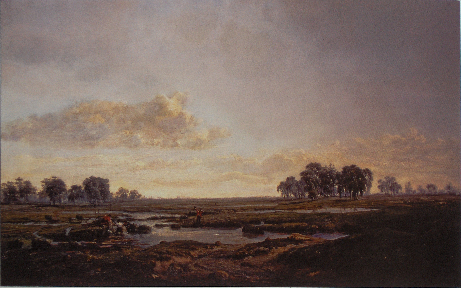 "Turfputten in de Kempen"; olieverf op doek; 67 x 108 cm; bezit : De Vrienden van de School van Tervuren